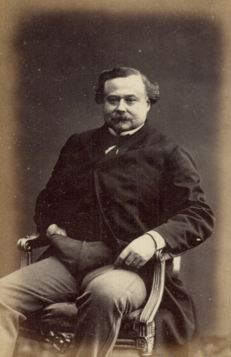 A. de Toulgoët